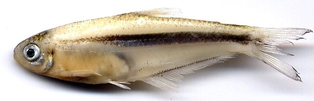 Argopleura diquensis